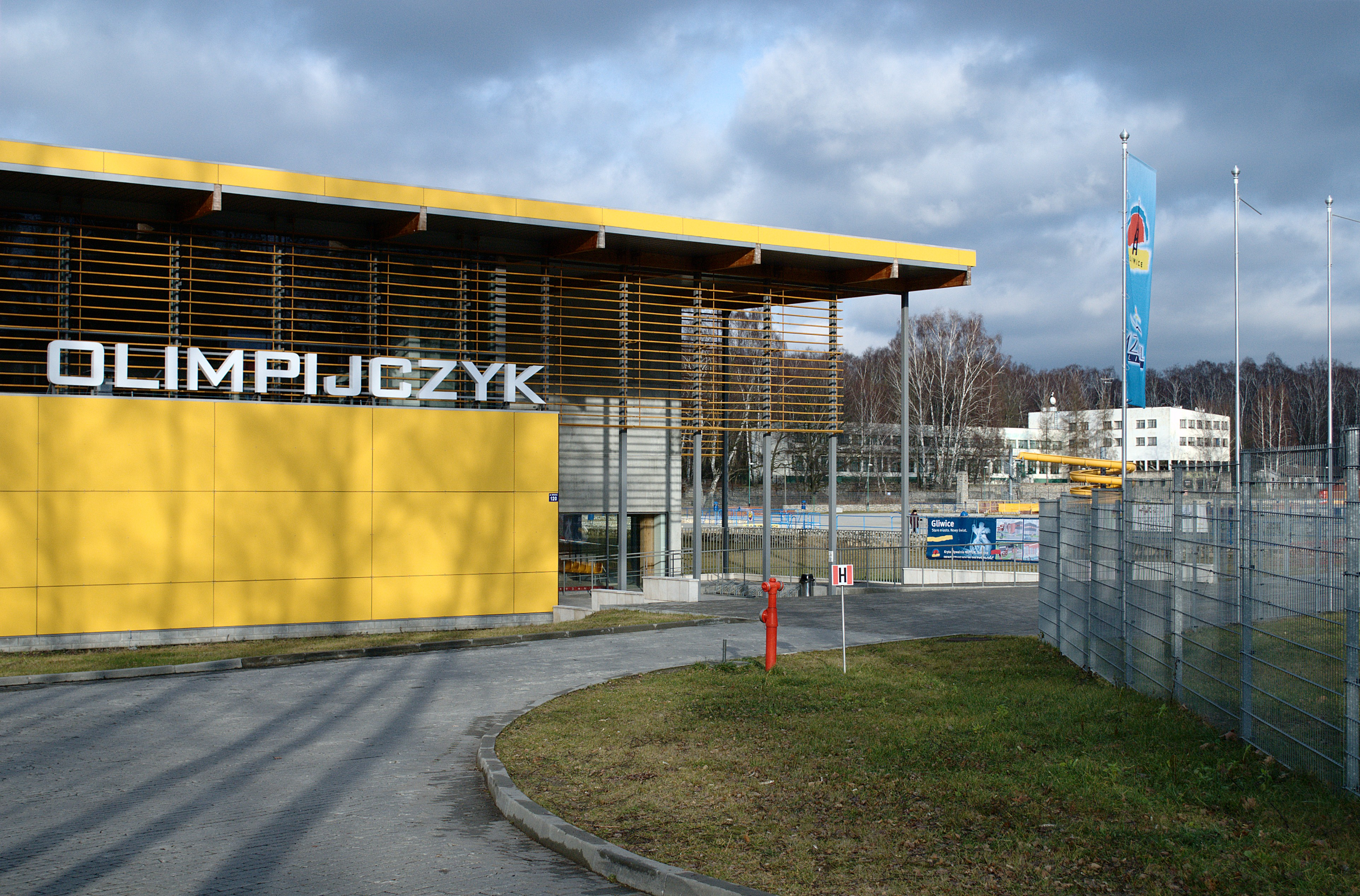 Kryta pływalnia Olimpijczyk.